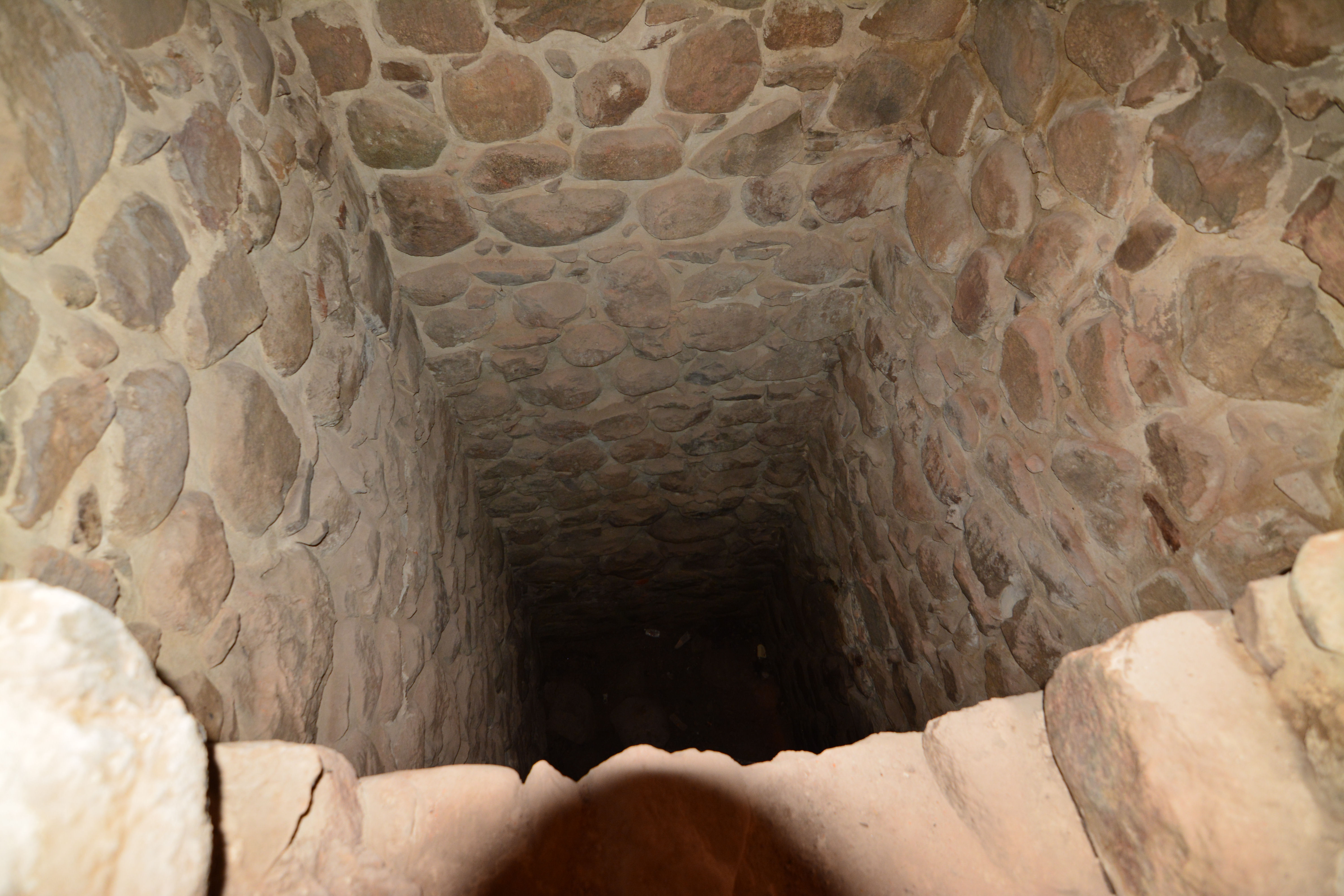 Pęzino - zamek, XIV, 1 poł. XVI, 1600, XIX